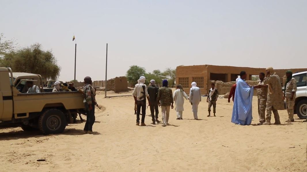 Combattants de la CMA lors d'une réunion avec des représentants de l'ONU à Ber, au Mali, en janvier 2017. 1